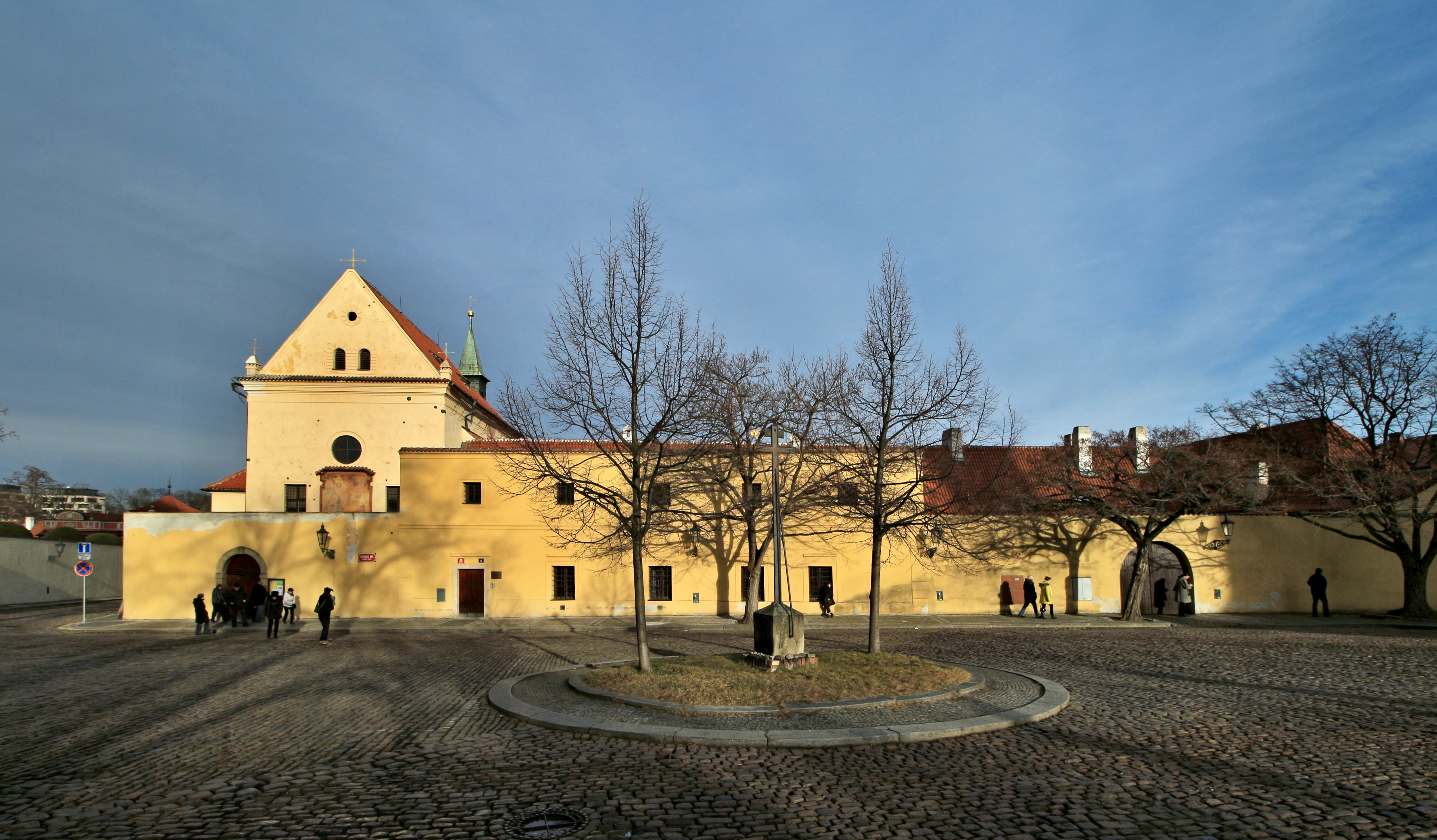 Kapucínský klášter na Loretánském náměstí